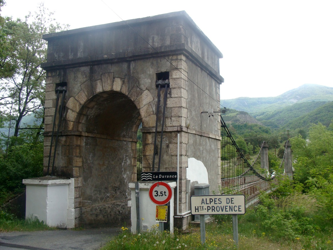 L'ancien pont suspendu de Venterol, vue d'ensemble depuis la rive droite. Noter l'arche massive et les ancrages accolés, dus à l'étroitesse de la rive.